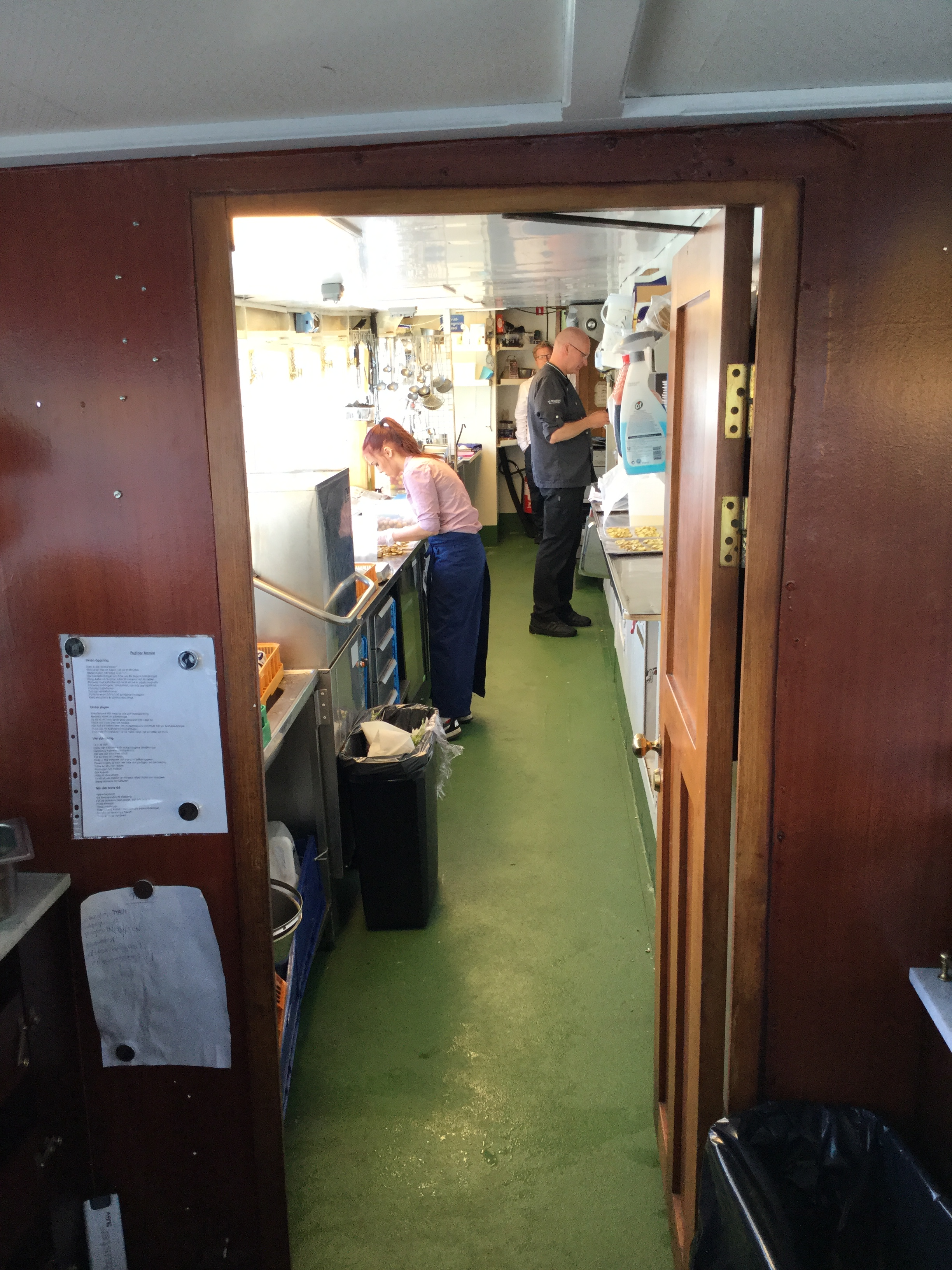 Kabyssen på S/S Drottningsholm (1909), 29 juni 2017.